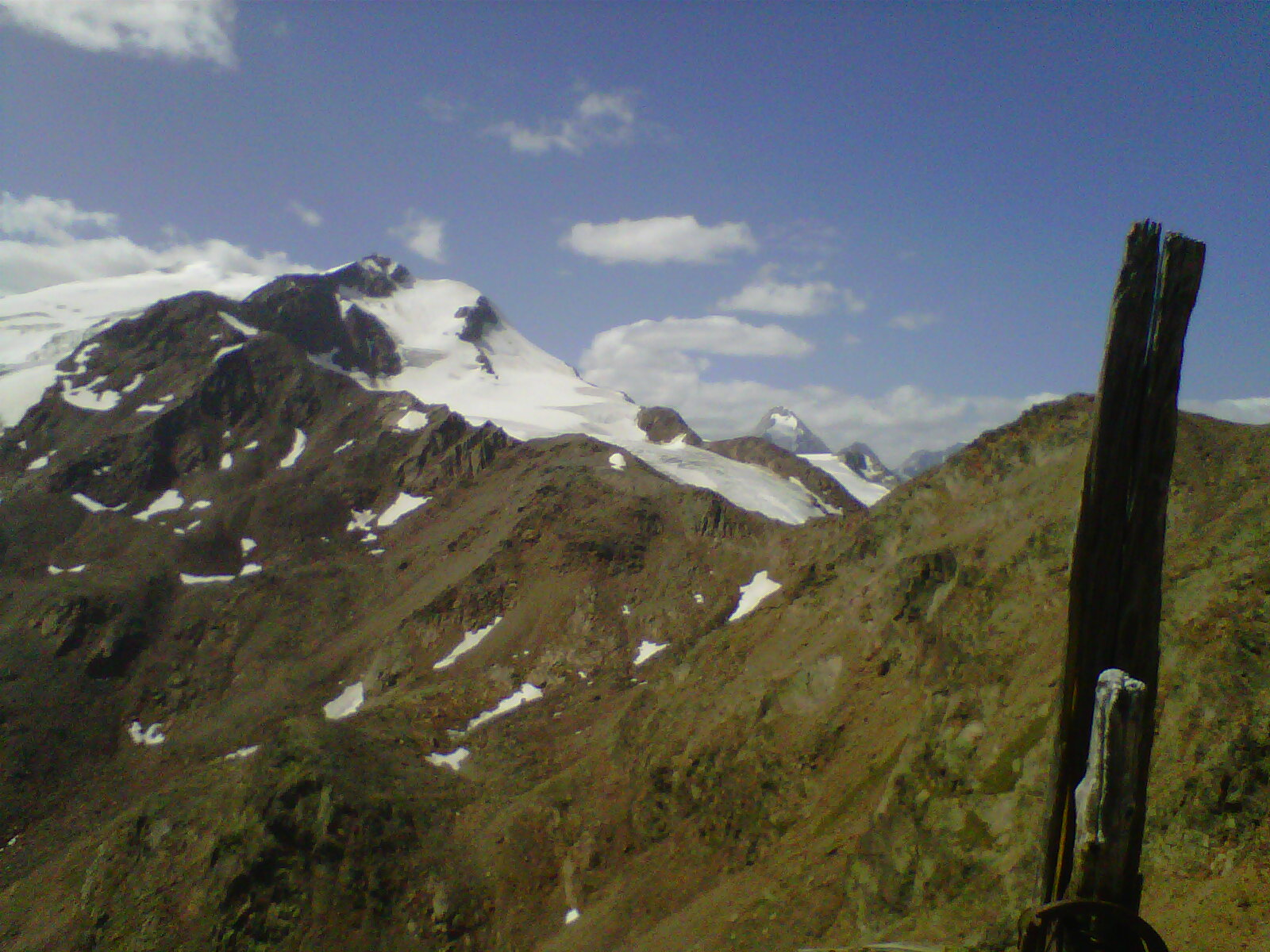 Palon de la Mare vista verso sud da cima Nera nel gruppo del Cevedale